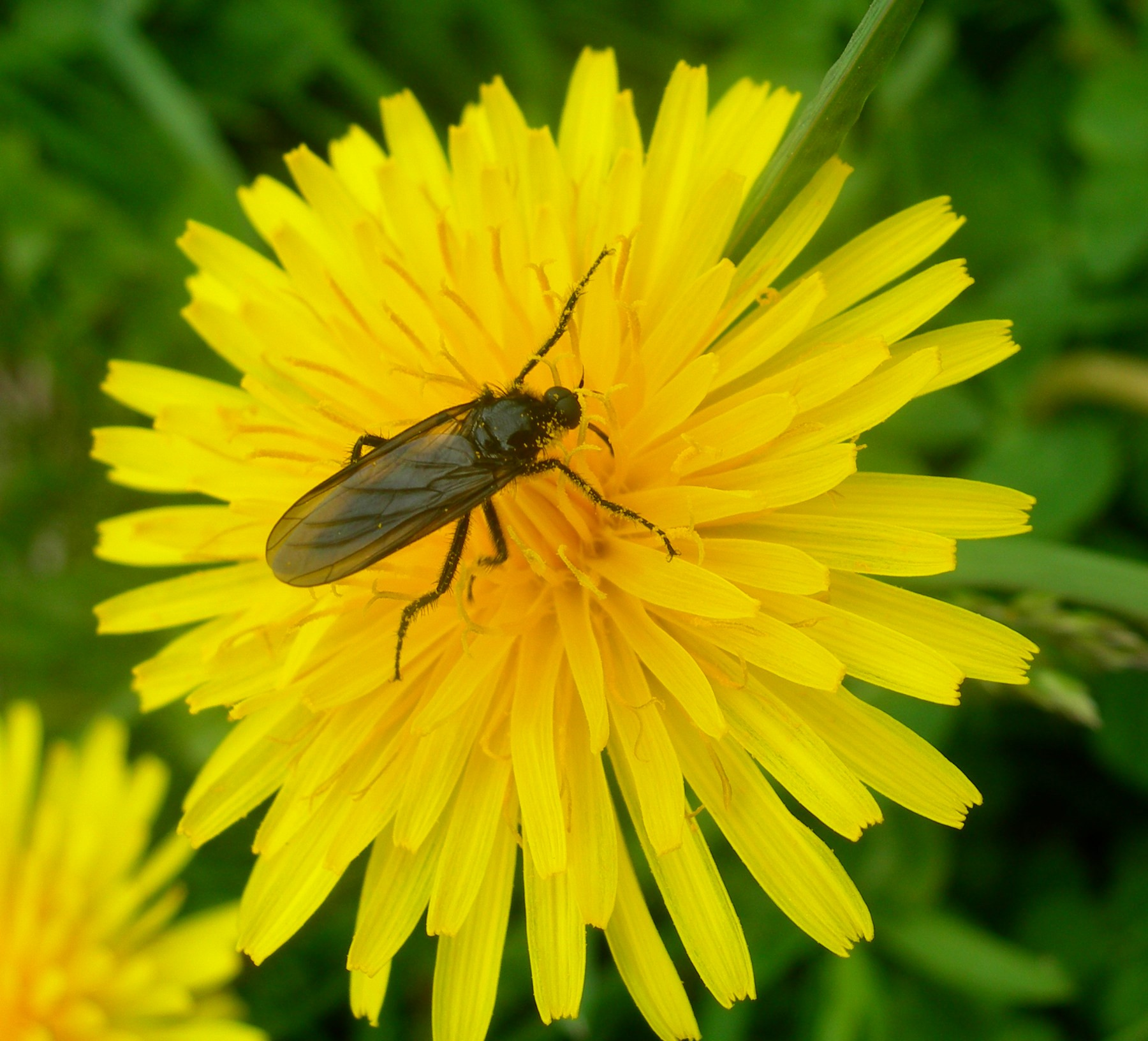 Mouche de la Saint-Marc (Bibio marci) sur un pissenlit, photographié près de Nonglard